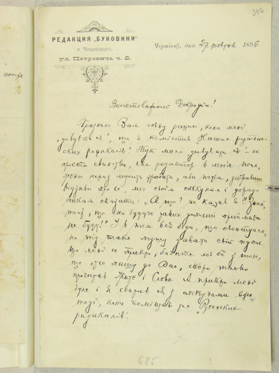 Лист Осипа Маковея до Івана Франка від 27 жовтня 1896 р. Інститут літератури ім. Т. Г. Шевченка НАНУ, відділ рукописних фондів і текстології. – Ф. 3. – №1613. – С. 685.